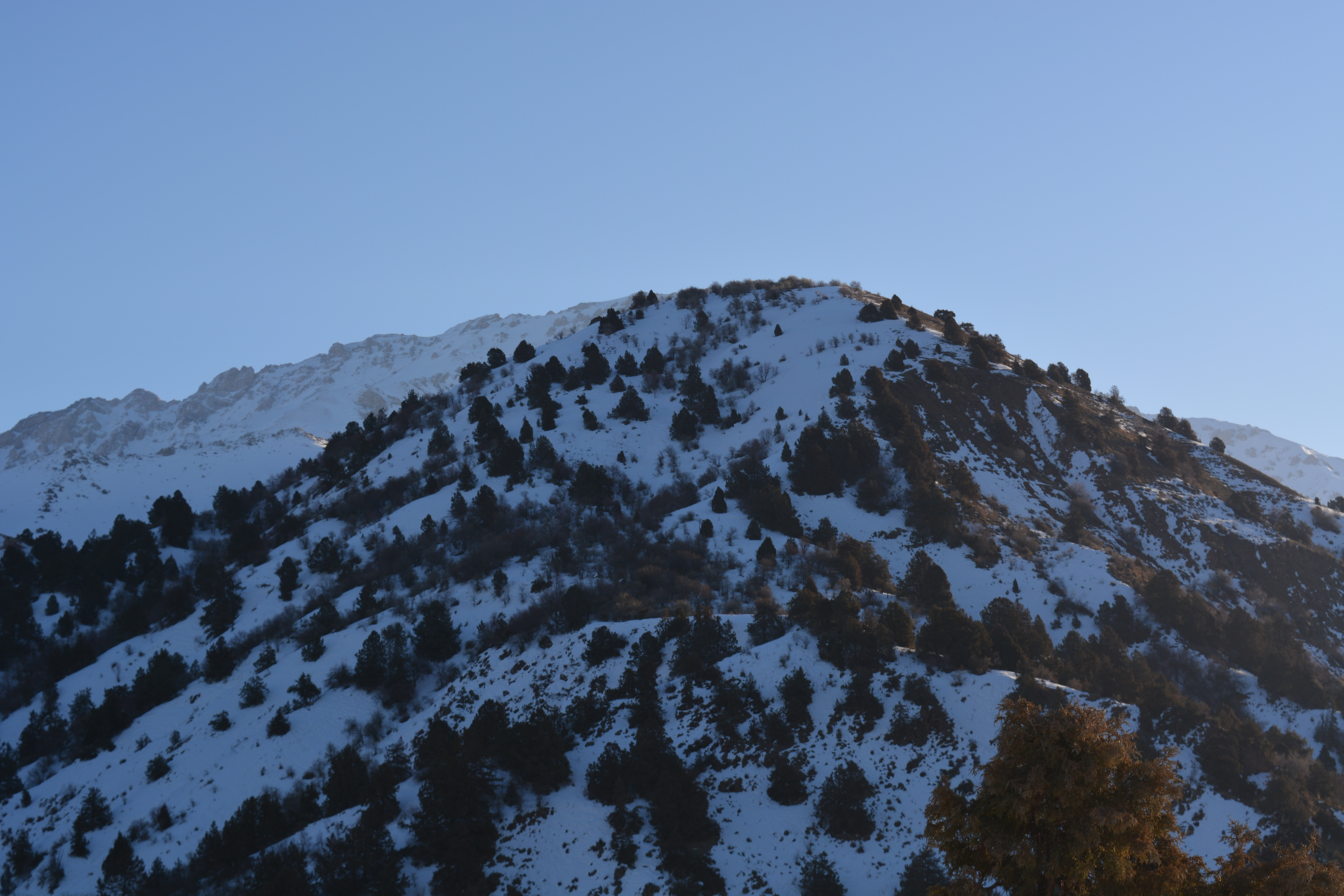 Горы Бельдерсай, Ташкентская область